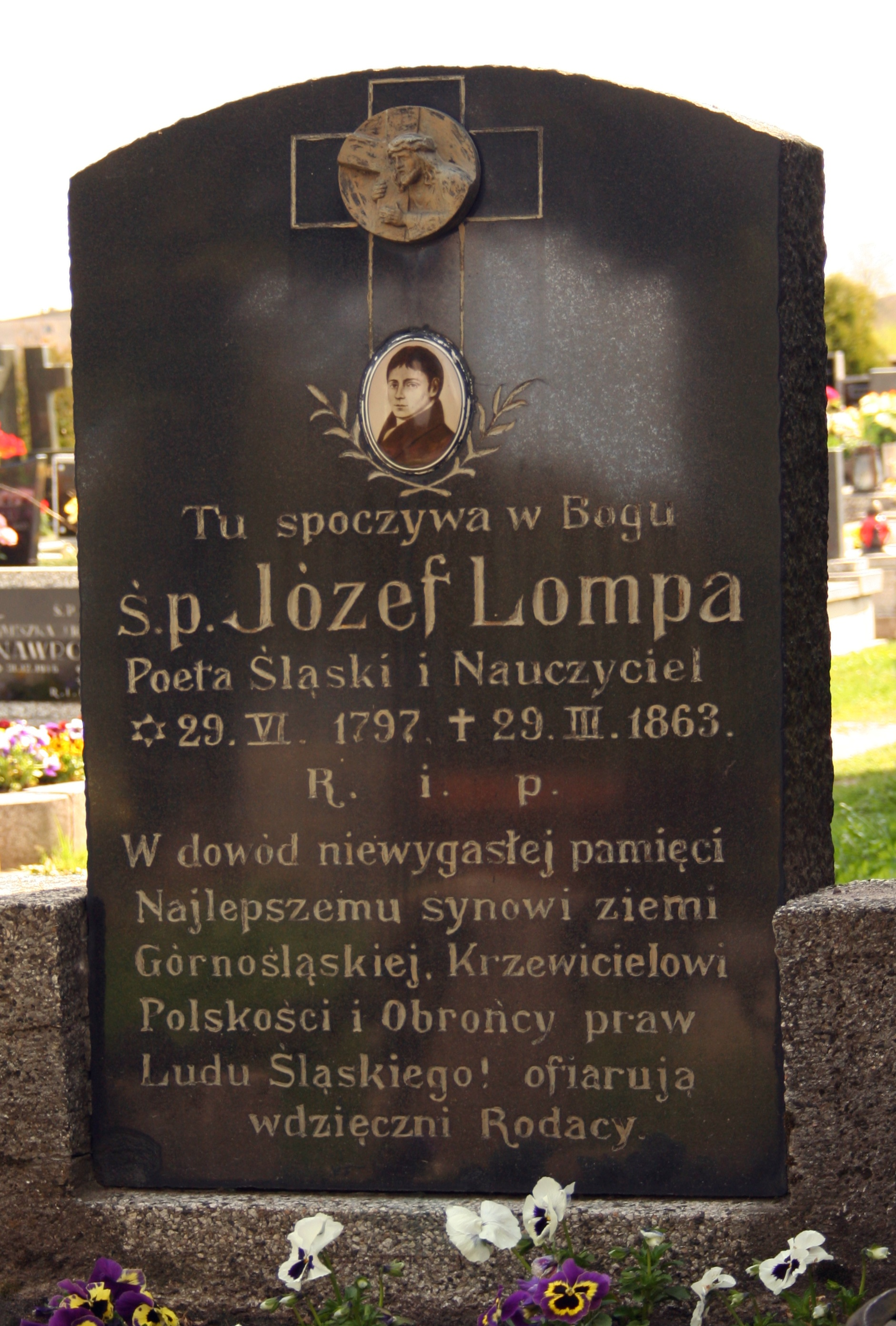 Tablica nagrobkowa Józefa Lompy przy kościele św. Walentego w Woźnikach, Polska, województwo śląskie, powiat lubliniecki